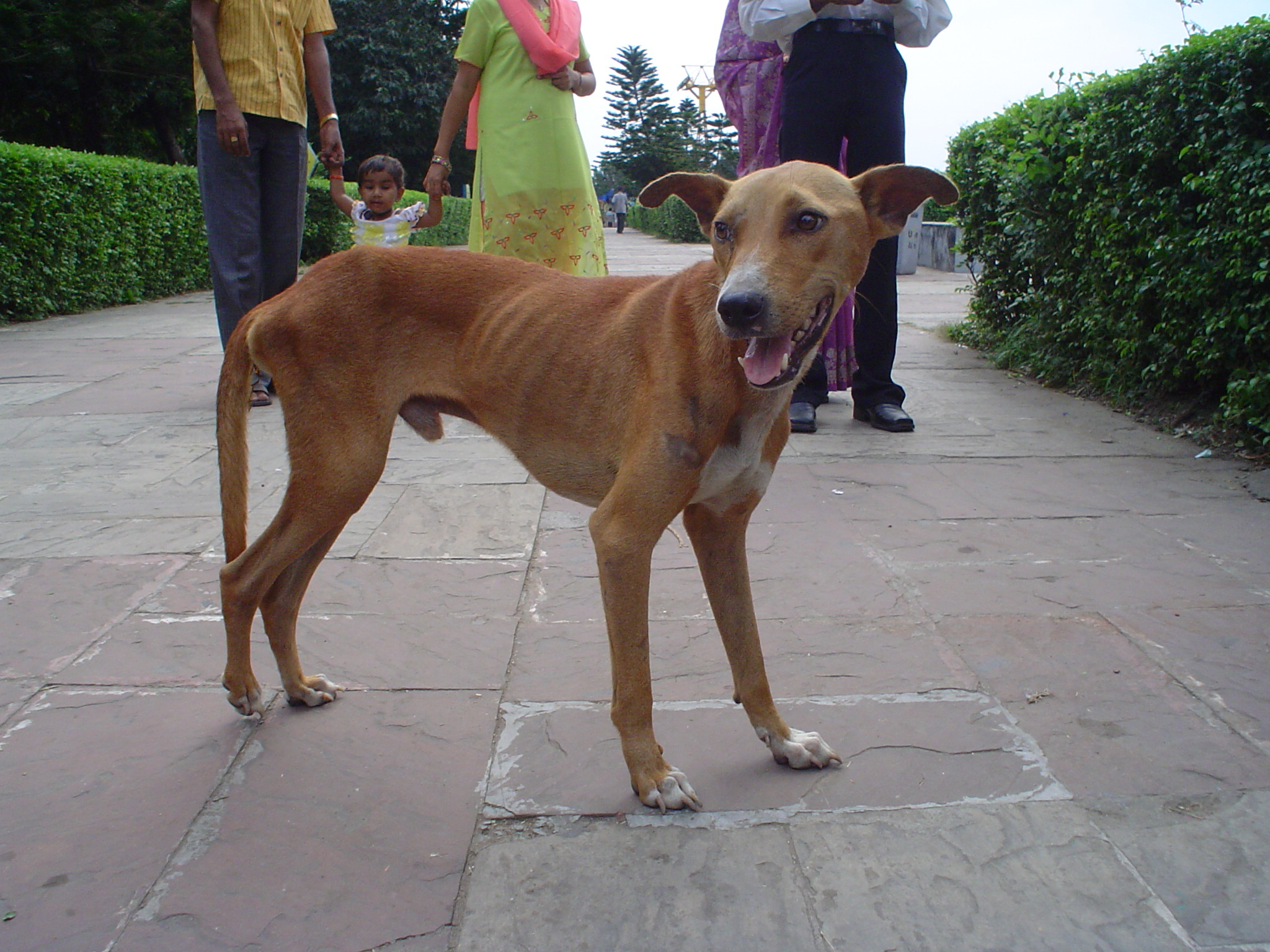 Common street dog at Kolkata.